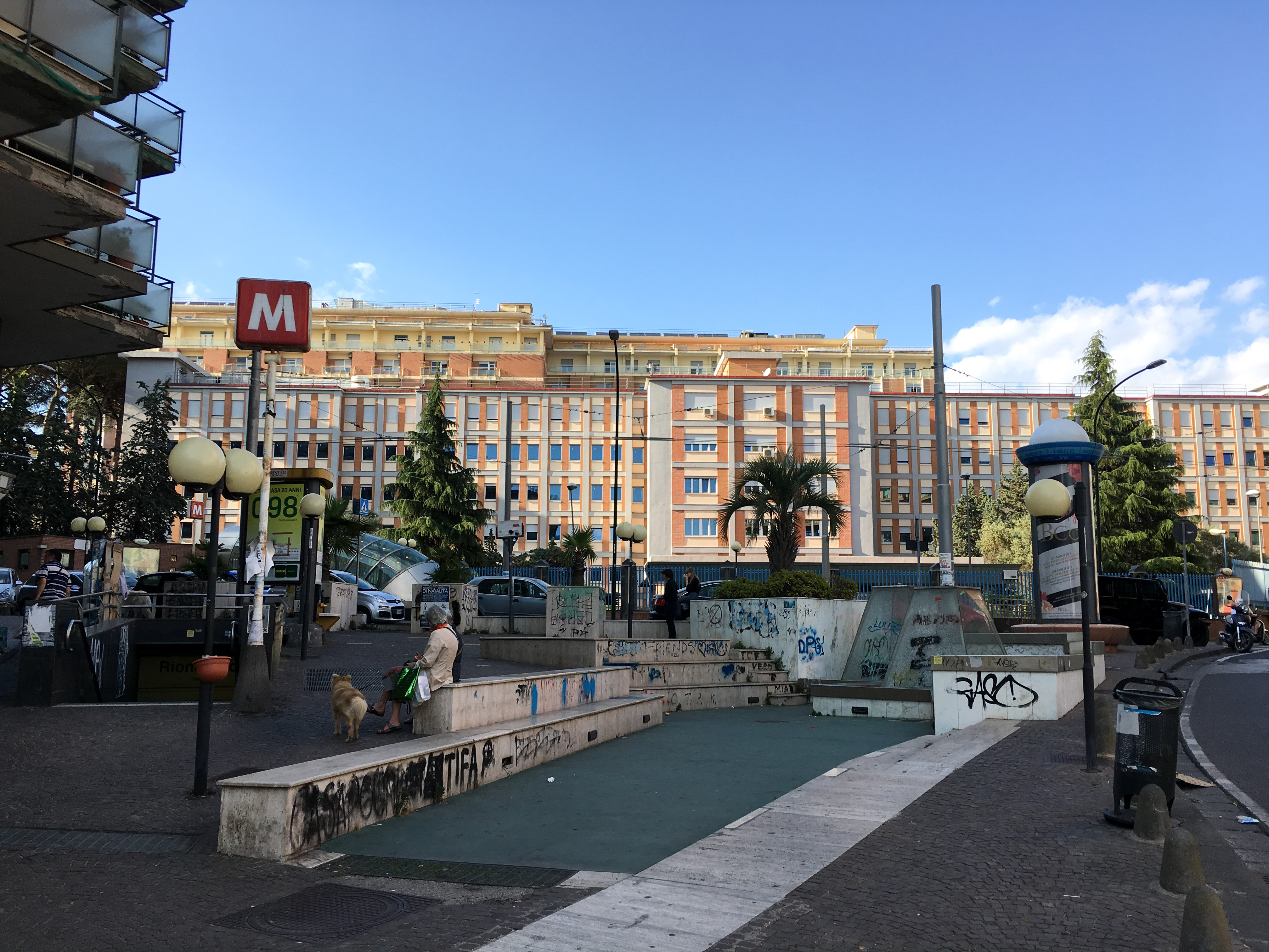 Stazione di Rione Alto – Esterno, con sullo sfondo l'ospedale Pascale.